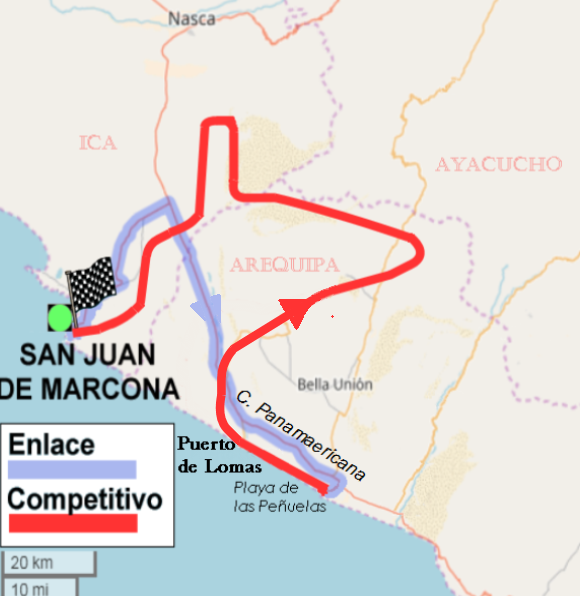 Dakar Rally 2018. Mapa de Etapa 4. San Juan de Marcona-San Juan de Marcona.